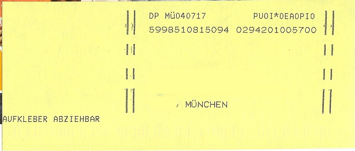 Deutsche Post - Aufkleber für Nachsendung (Name und Wohnanschrift unkenntlich gemacht)